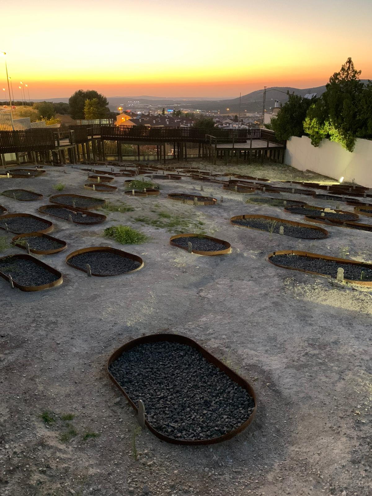 Interior de la Necrópolis judía de Lucena